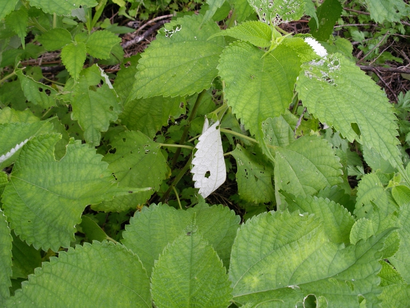 Boehmeria nivea (カラムシ)